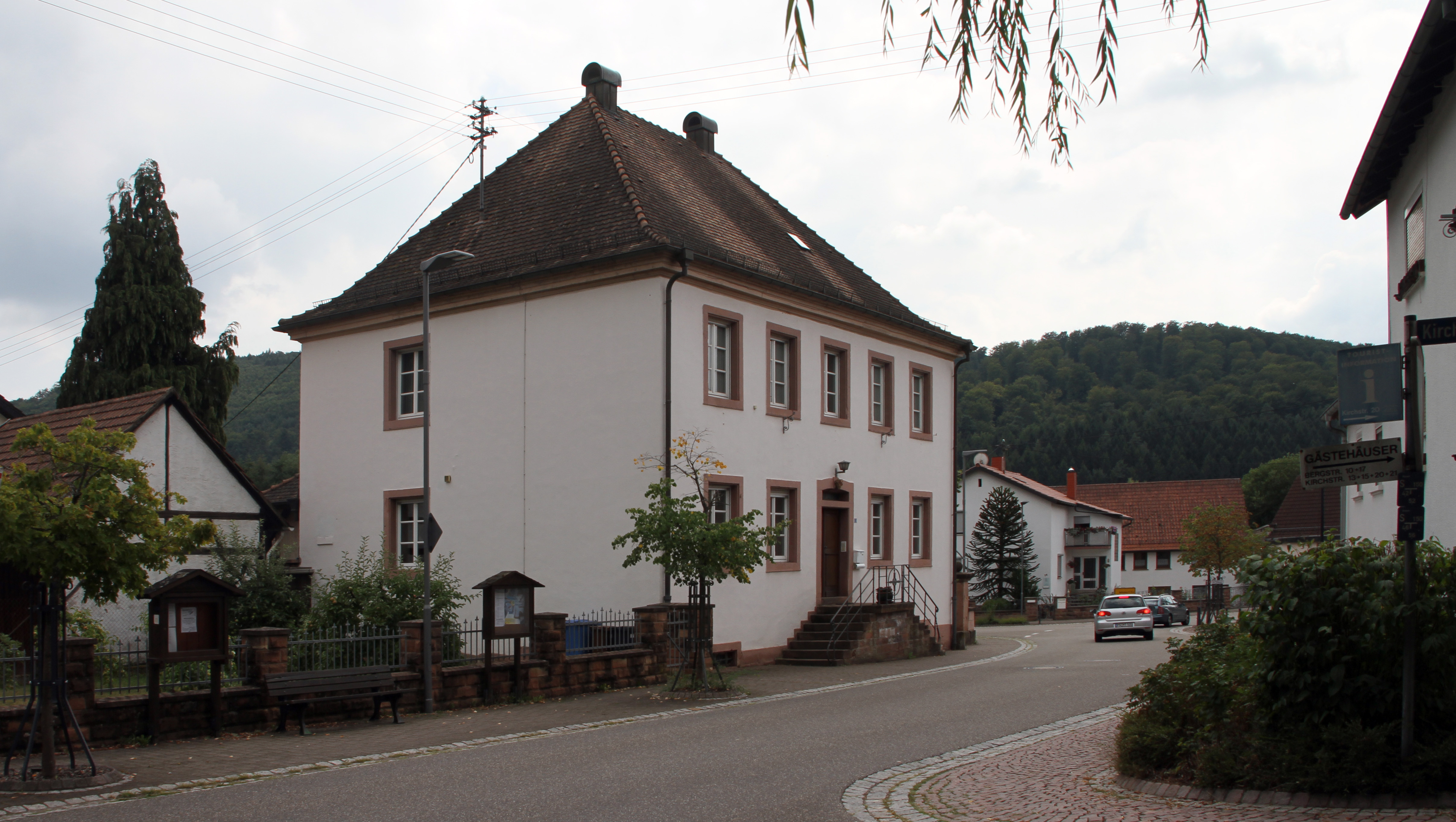 Niederschlettenbach, Hauptstraße 16; Walmdachbau, 18. Jahrhundert, Hofeinfahrt mit Sandsteintorpfosten.